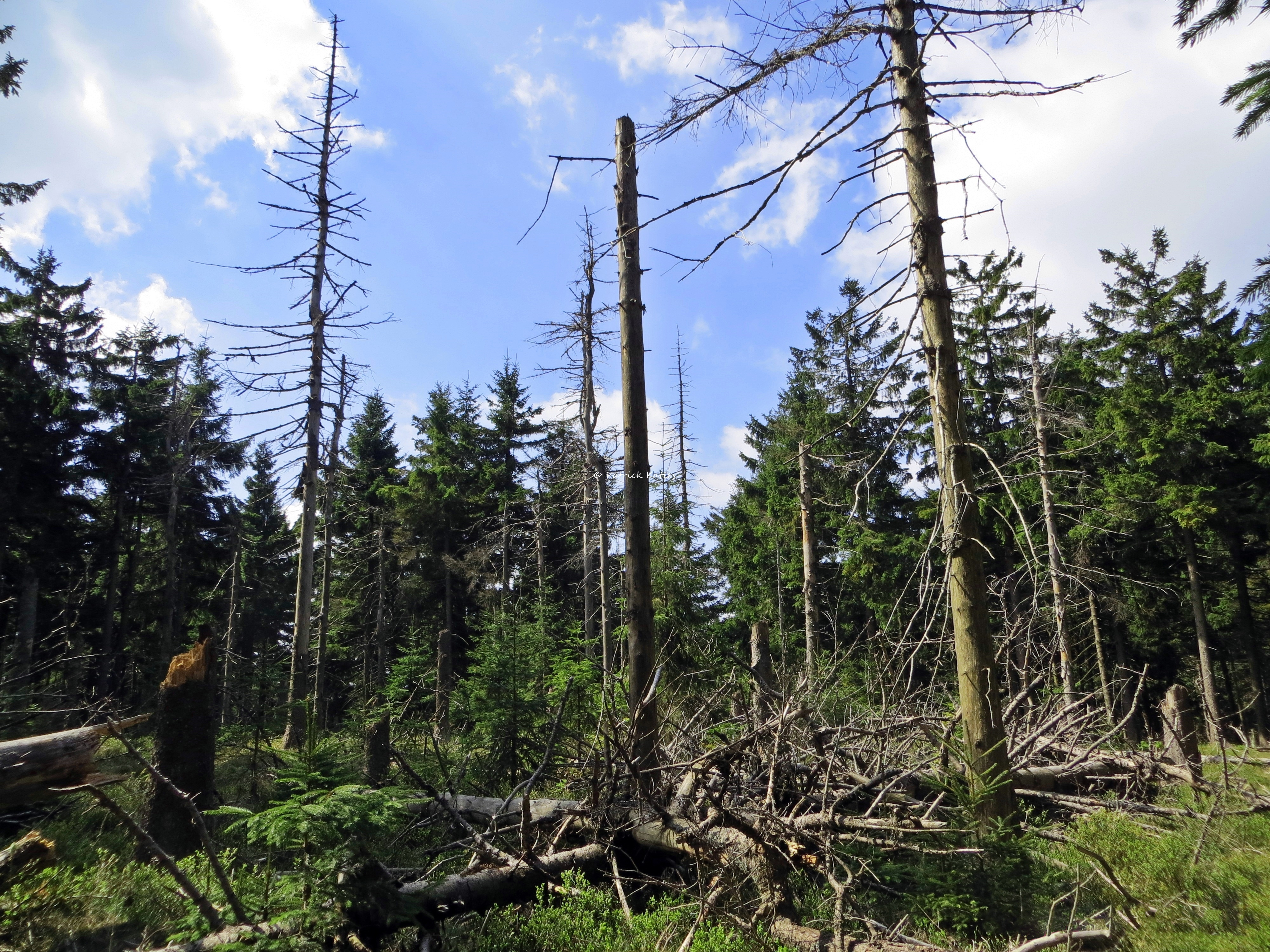 Zeitzeugen aus den 80ern, dieses Bild zeigt abgestorbene Fichten auf den Höhen des Steinwaldes zwischen Platte und Katzentrögel. Heute wachsen junge, gesunde Fichten heran.